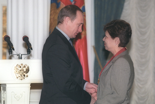 МОСКВА, КРЕМЛЬ. Церемония вручения государственных наград. Орден «За заслуги перед Отечеством» III степени вручен многократной чемпионке мира и Олимпийских игр по фигурному катанию Ирине Родниной.